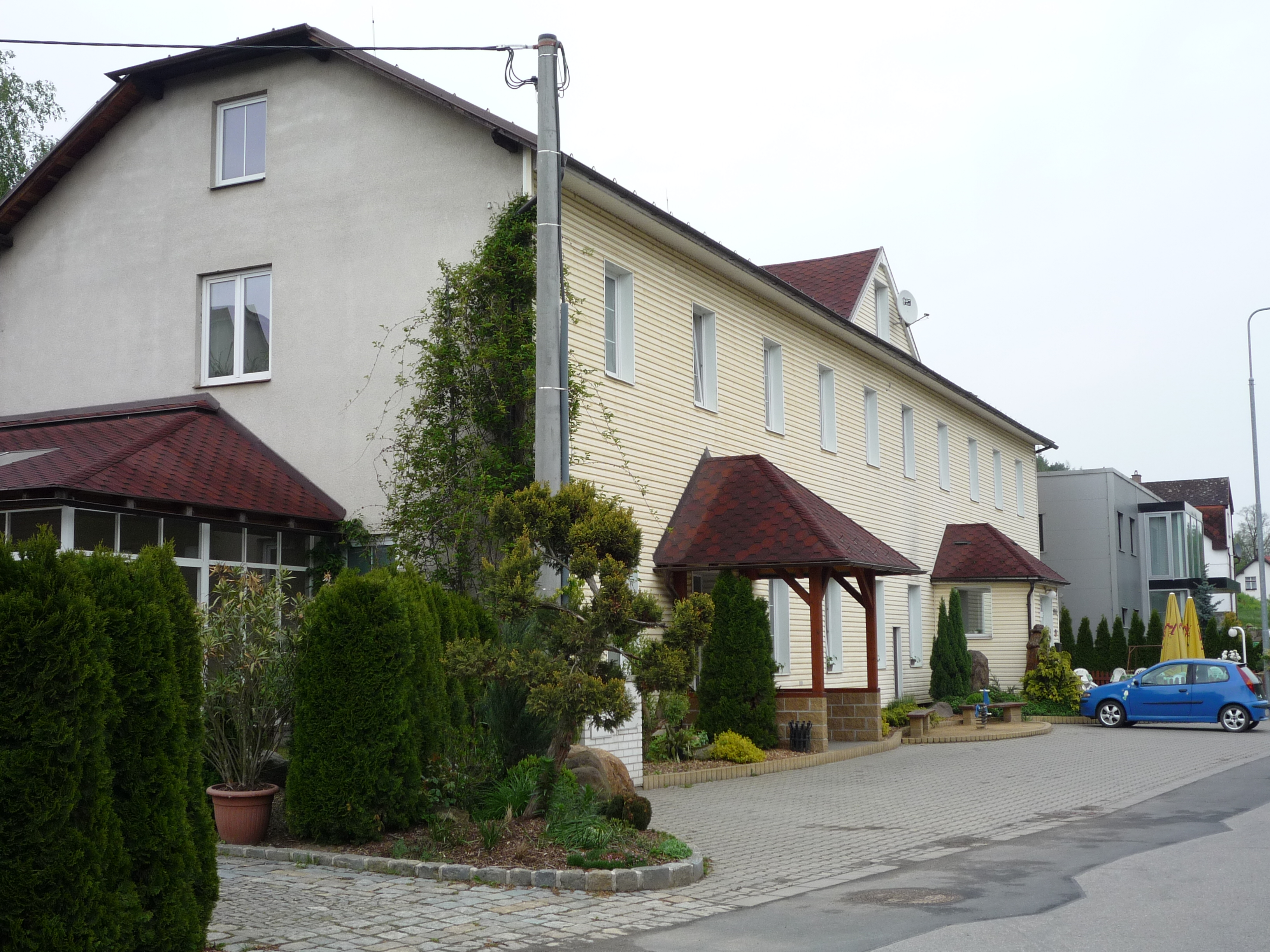 Autor fotografie Jiří Zelenka. Toulky vysočinou. Pohledští Dvořáci . Okr.Havlíčkův Brod. Kraj Vysočina.